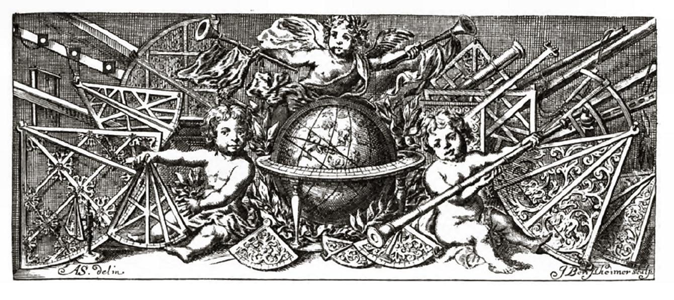 Panoplie de quadrants divers de Hevelius